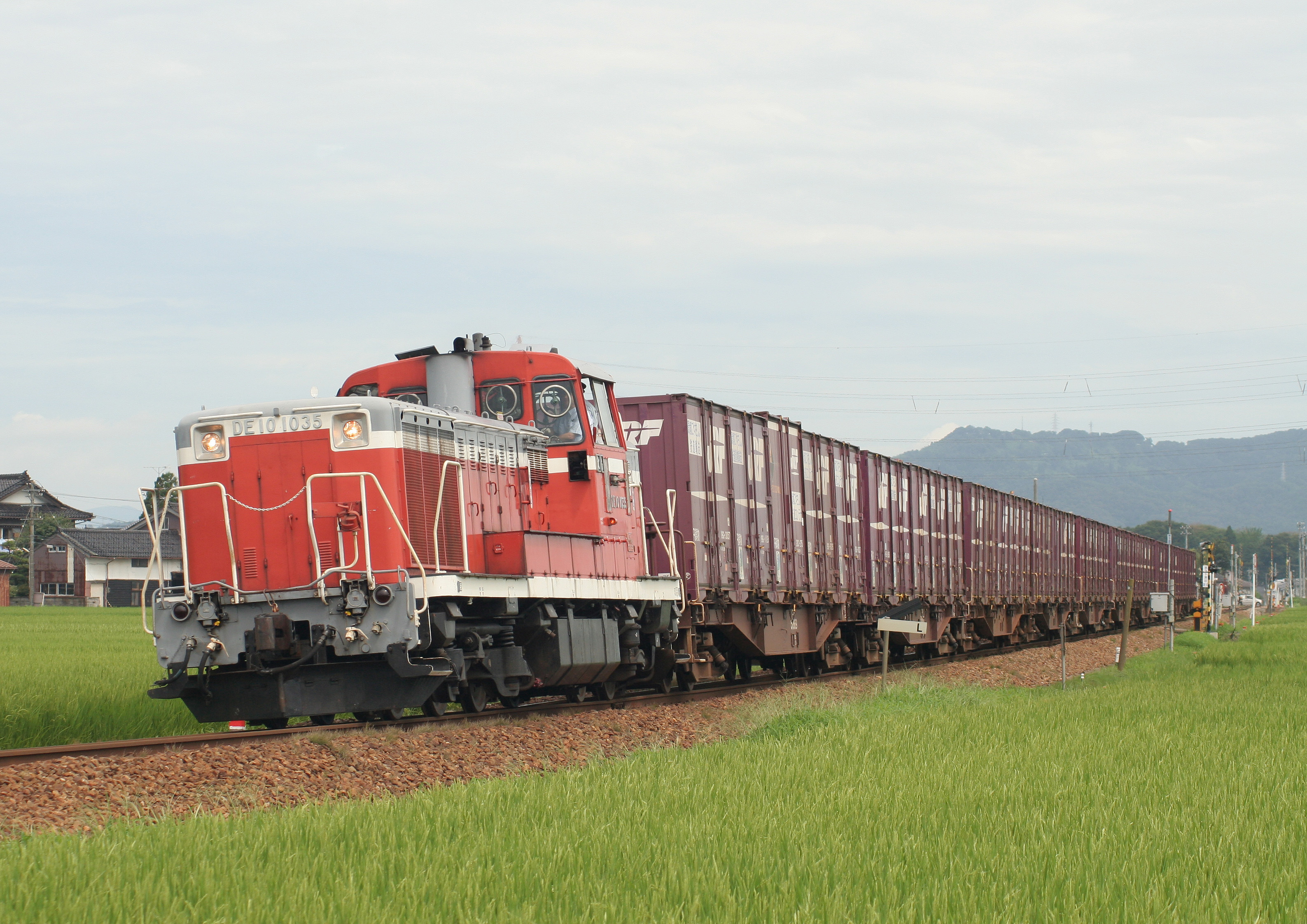 JR西日本DE10形ディーゼル機関車1035号機（貨物列車） 城端線 高山 - 二塚